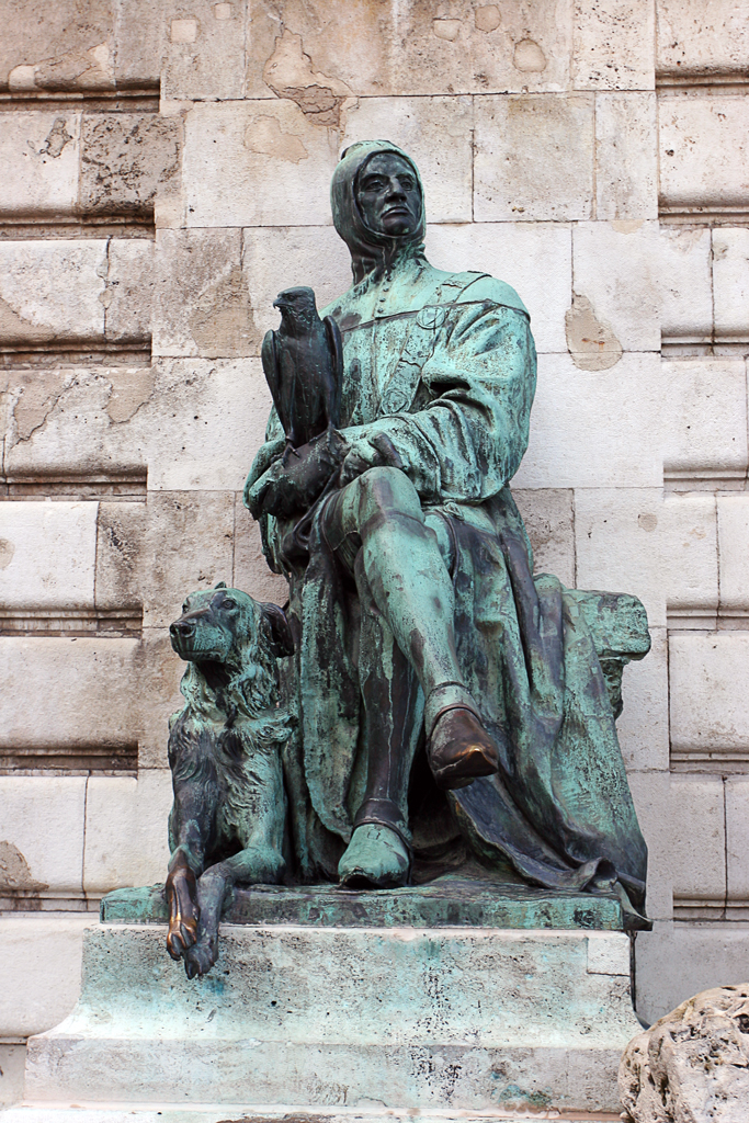 El humanista Galeotto Marzio con un halcón en su brazo (grupo escultórico "Fuente de Matías", en Budapest)